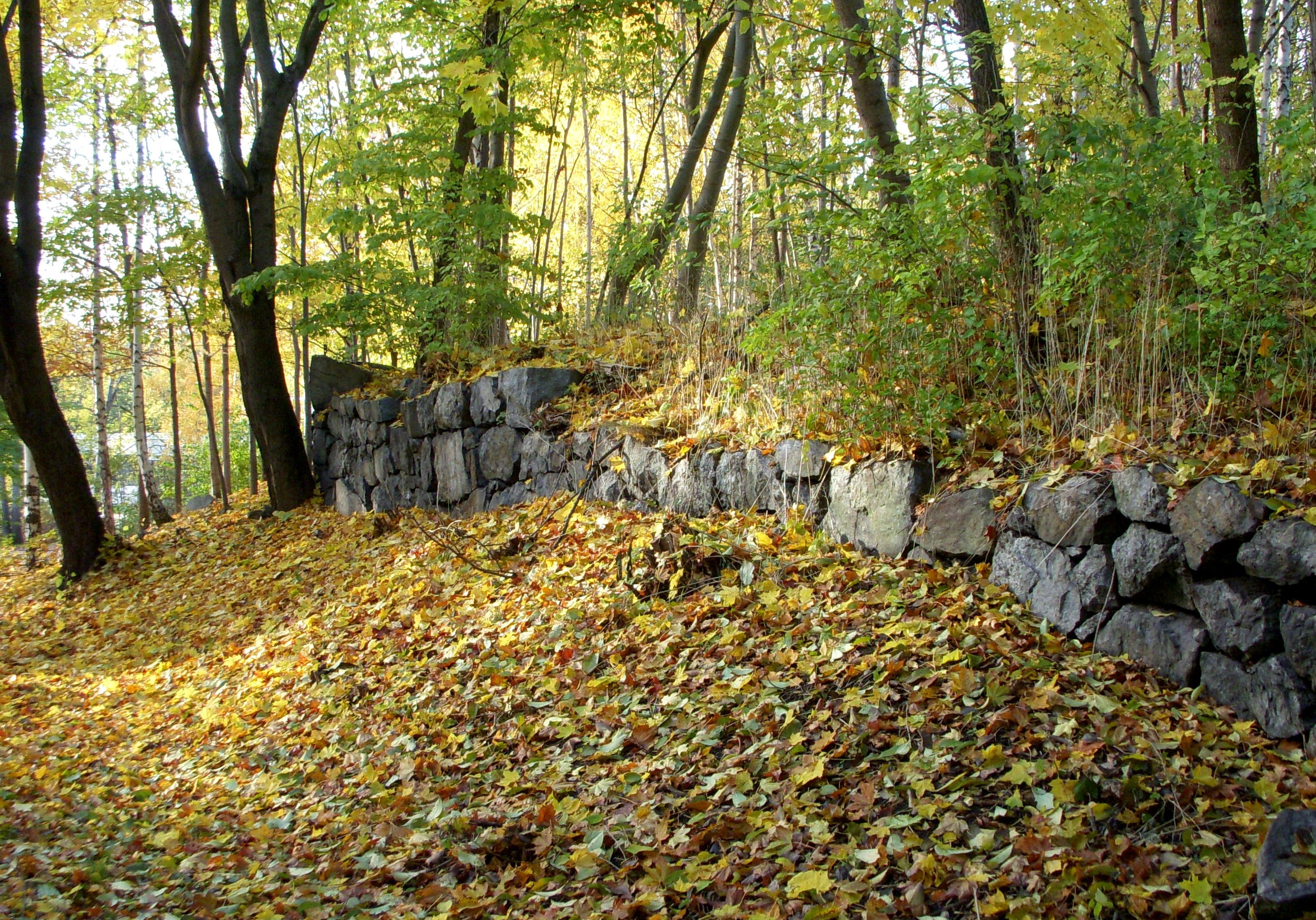 Nynäs vid sjön Trekanten i Sköndal, äldre fundament efter tidigare bebyggelse